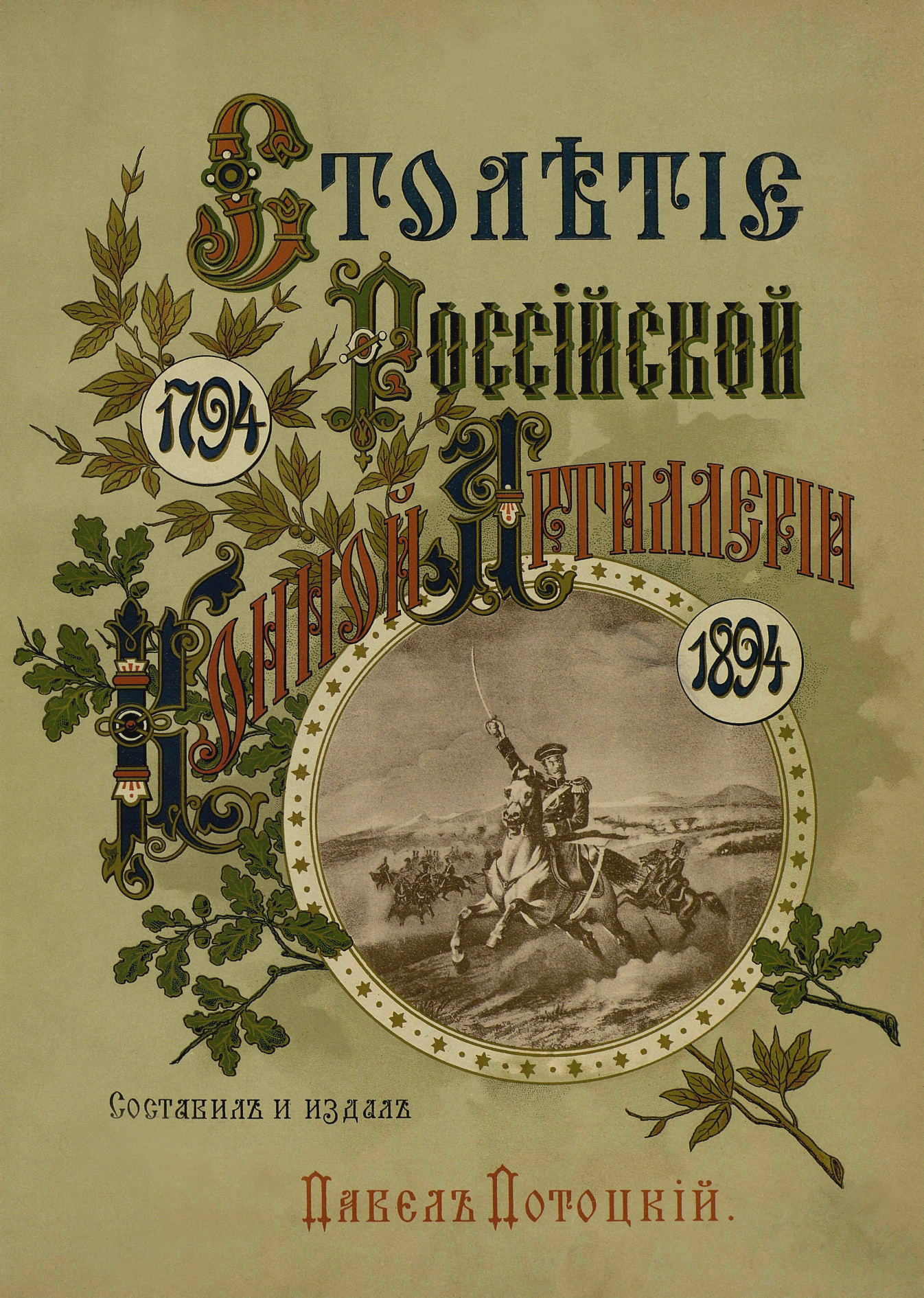 Титульный лист книги П. П. Потоцкого «Столетие Российской Конной Артиллерии. 1794—1894 г.»